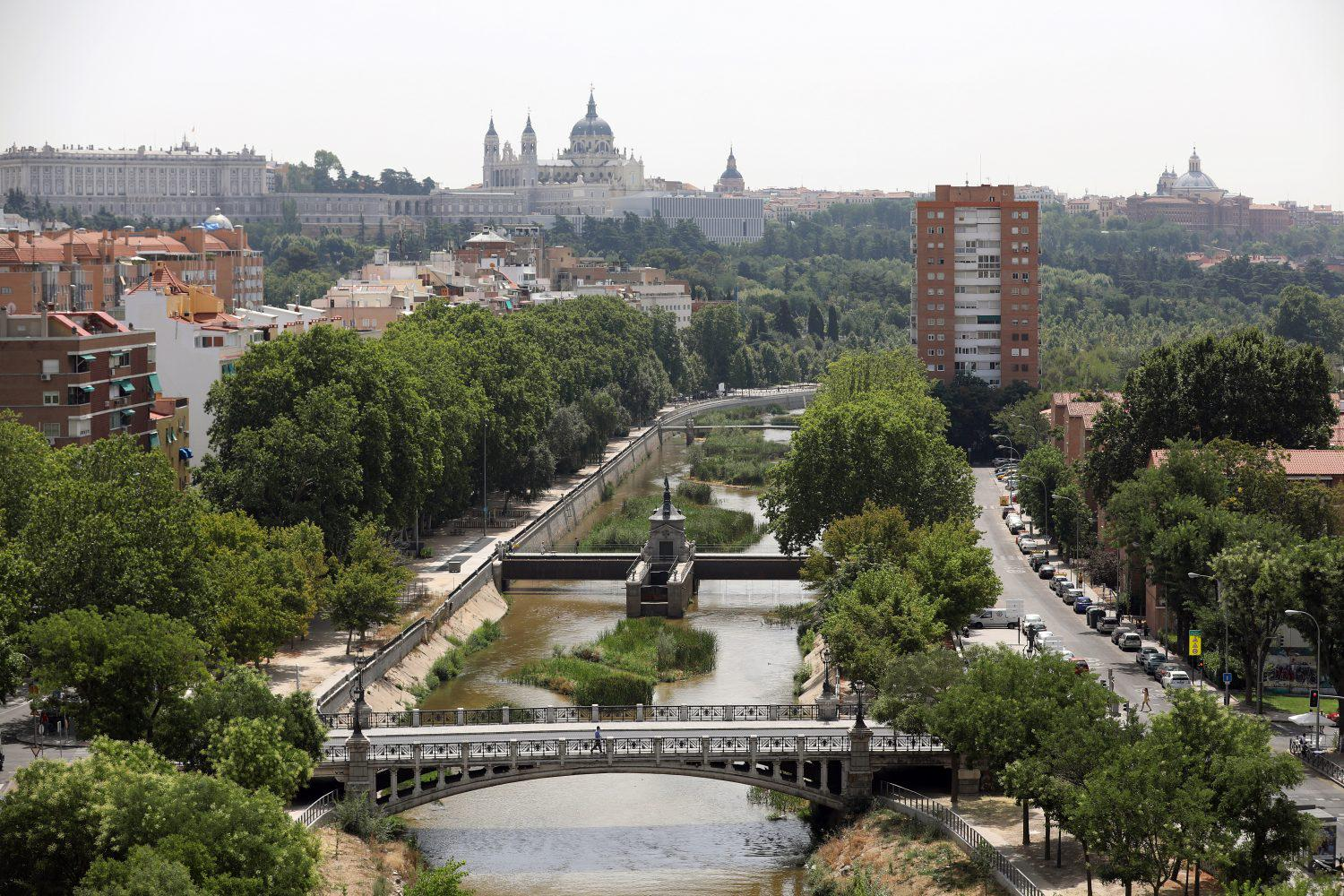 El Pleno municipal celebrado hoy en el Palacio de Cibeles ha aprobado por mayoría impulsar un acuerdo ‘verde’ para la ciudad de Madrid, con el fin de establecer un plan de inversiones que permita generar un polo de desarrollo y de empleo en torno a la economía verde: residuos, energía, electrificación de la ciudad, movilidad, biodiversidad, etc.